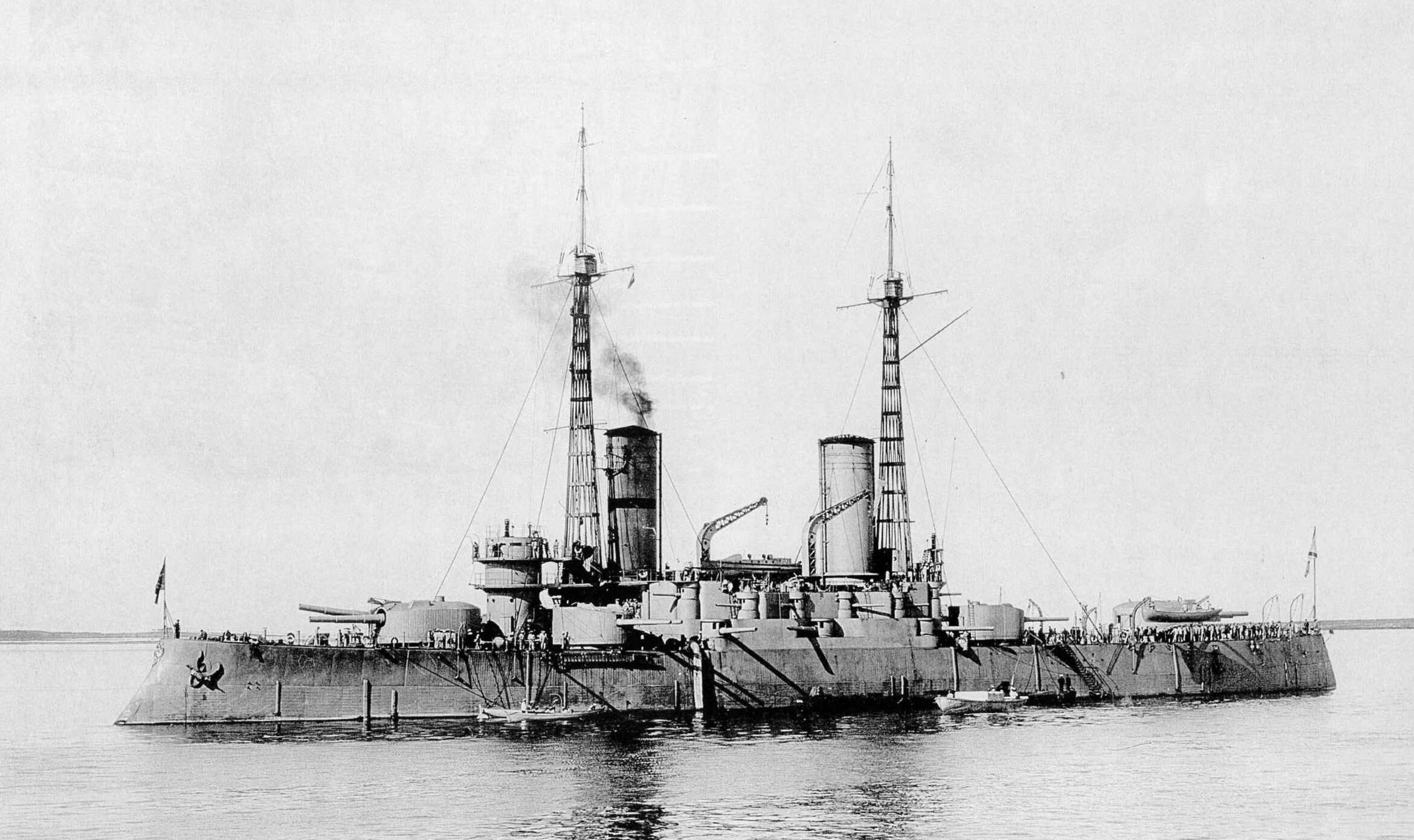 Линейный корабль Император Павел I в районе Ревеля, начало июня 1912 года. Contents 1 Licensing 2 Источник 3 Licensing 4 Original upload log Licensing Источник Автор фотографии Е. Иванов Р.М. Мельников. Линейный корабль Император Павел I. 1904-1925 гг. Истфлот, Самара. 2005 год ISBN 5-98830-013-8